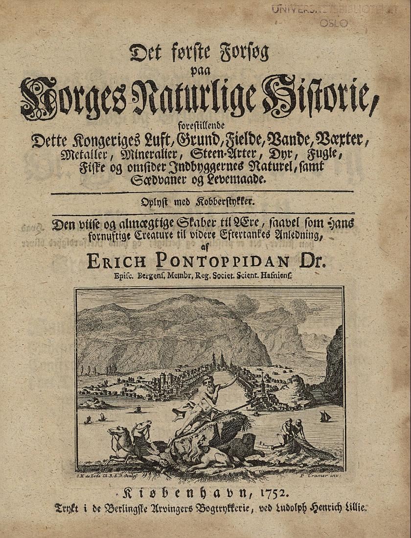 Det første Forsøg paa Norges naturlige Historie bok av Erik Pontoppidan, utgitt i København 1752–53